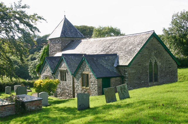 Bittadon church